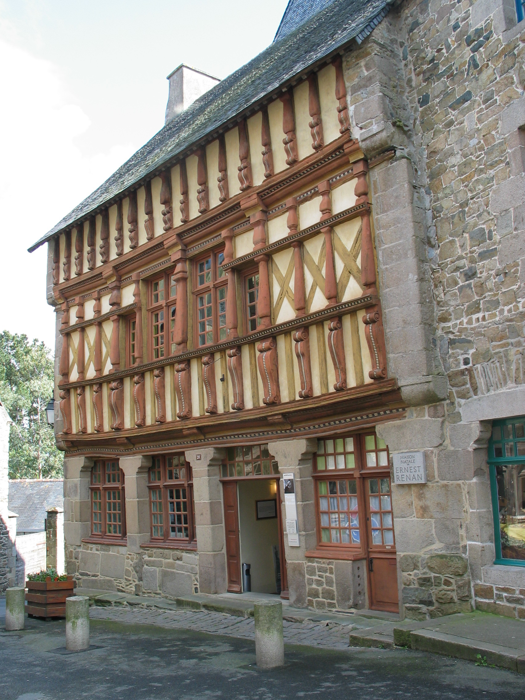 Maison musée Ernest Renan à Tréguier (Bretagne)